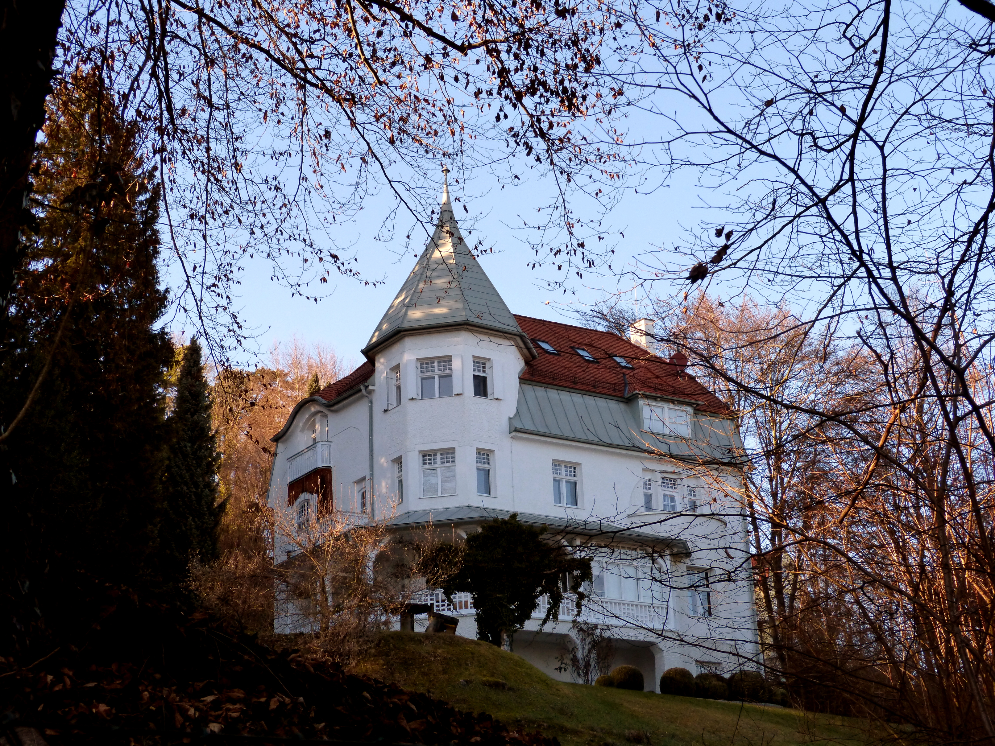 Feldafing, Thurn-und-Taxis-Straße 13, Villa Feinhals. Zweigeschossig mit Mansarddach, Eck-Erkerturm und Veranda an der Seeseite, Jugendstil-Putzdekor. 1902 von Eugen Drollinger für den Münchner Hofopernsänger Fritz Feinhals erbaut.